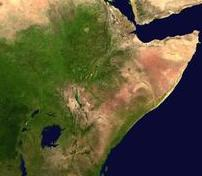 האזור "קרן אפריקה"